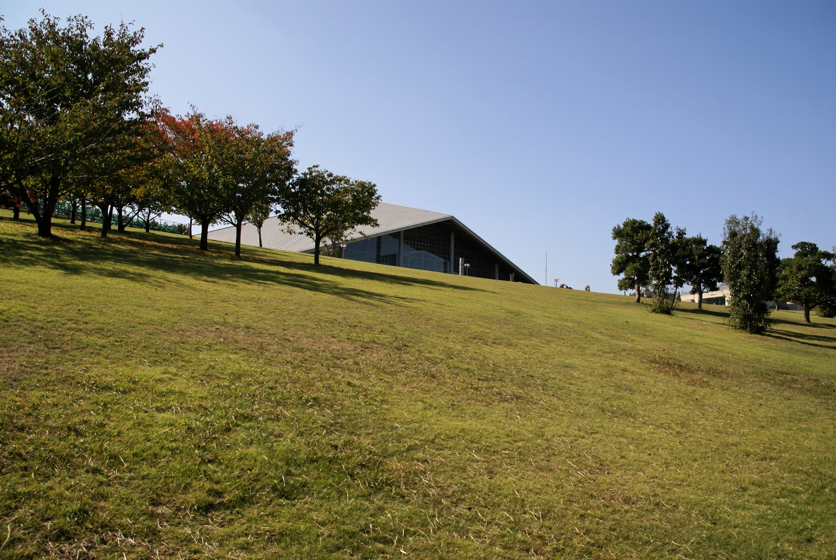 Toramaru Park in Higashikagawa, Kagawa prefecture, Japan